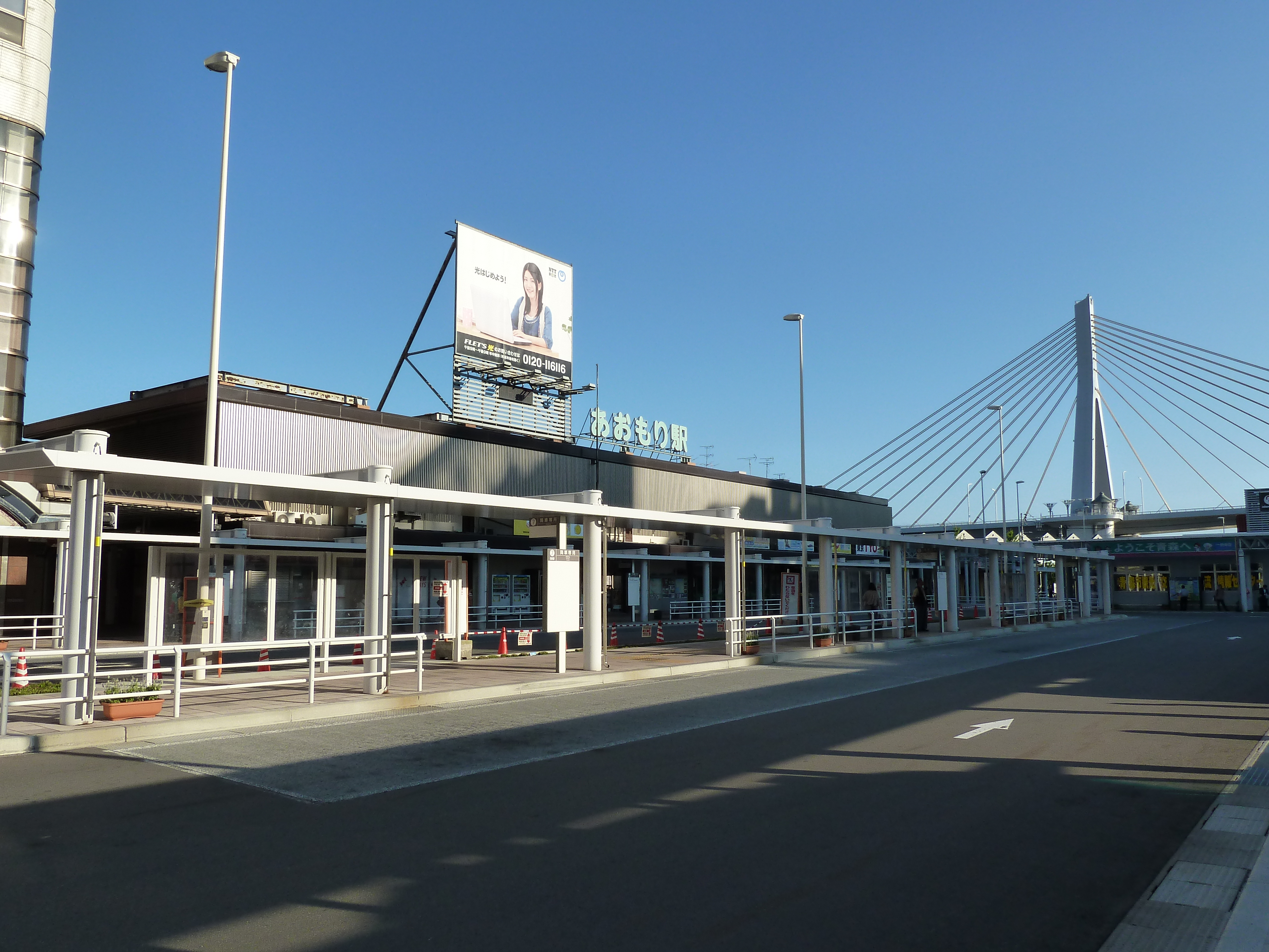 青森駅周辺